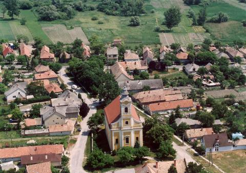 La pli nova katolika preĝejo en Peremarton.